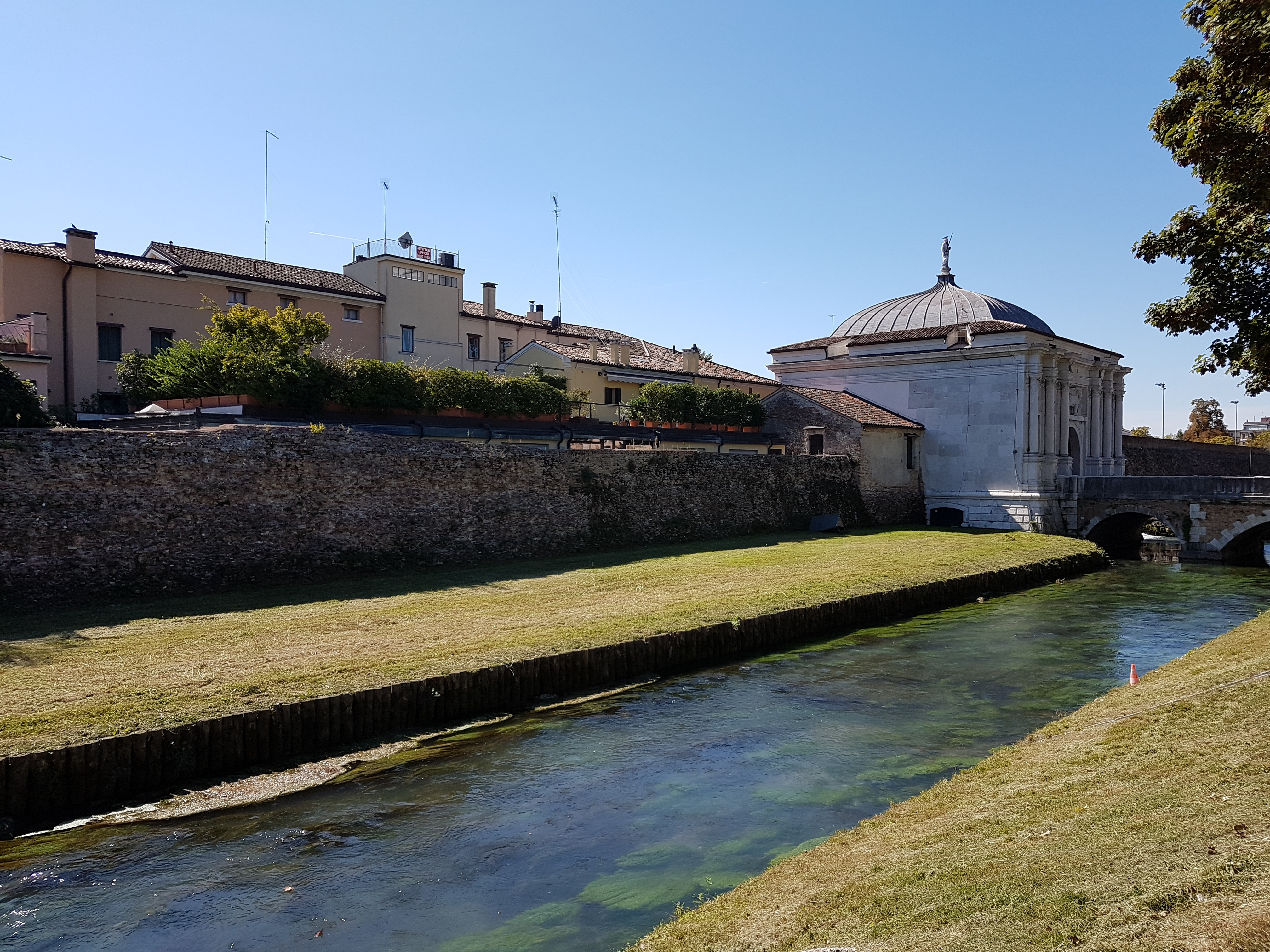 Treviso - Porta San Tomaso und angrenzende Stadtmauern